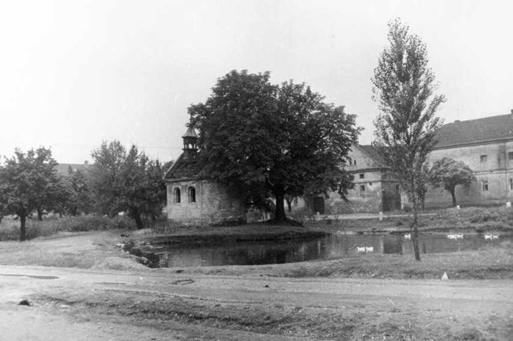 Ehemaliges Dorf Vršany (Würschen) bei Most (Brüx) in Tschechien.